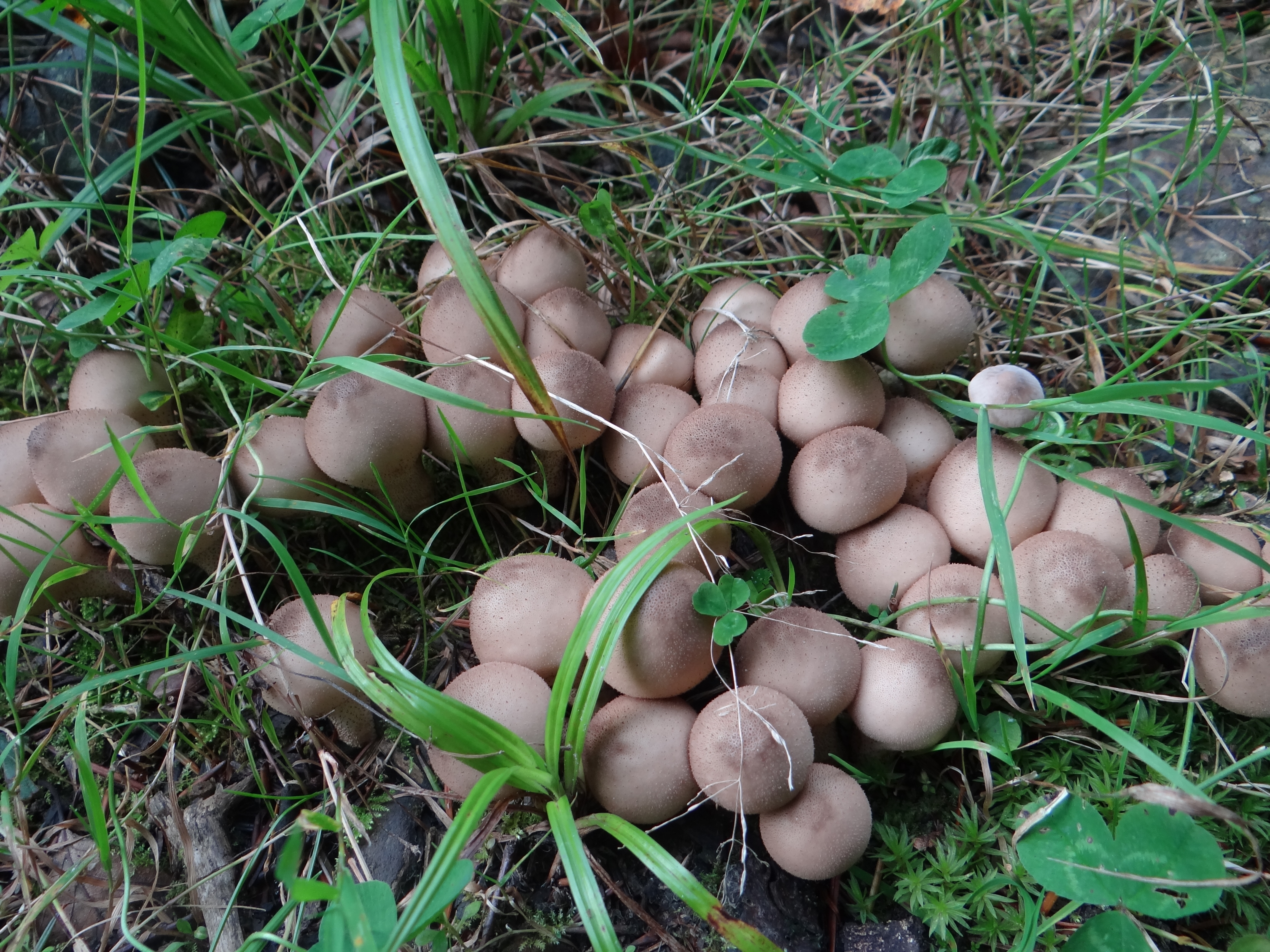 Lycoperdon pyriforme (location: Poland, Pieniny, podnóże Trzech Koron)